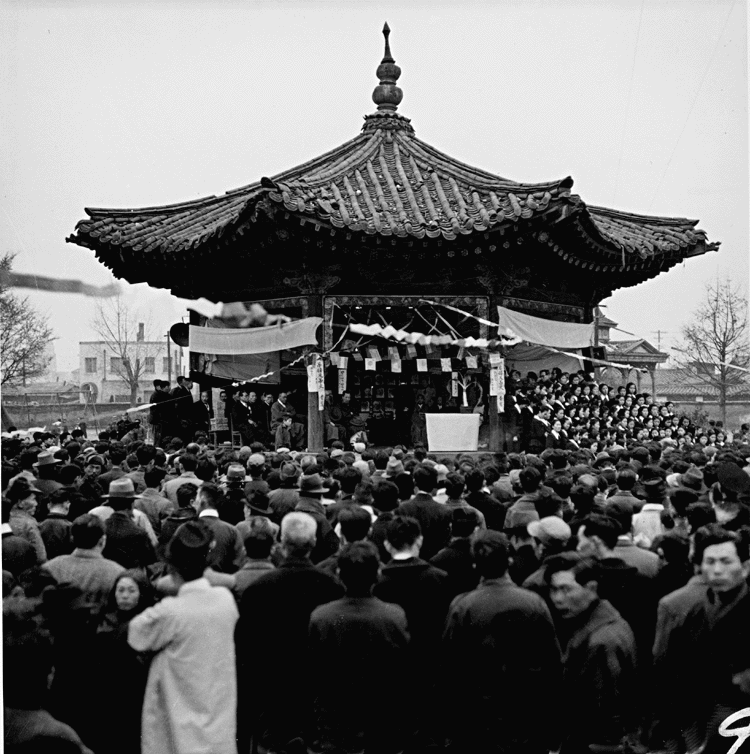 촬영일 : 1954년 03월 01일 촬영장소 : 대한민국 서울 탑골공원 참석자 : 미상 관련내용 : 탑골공원에서 제35회 3·1절 기념식이 열렸다.